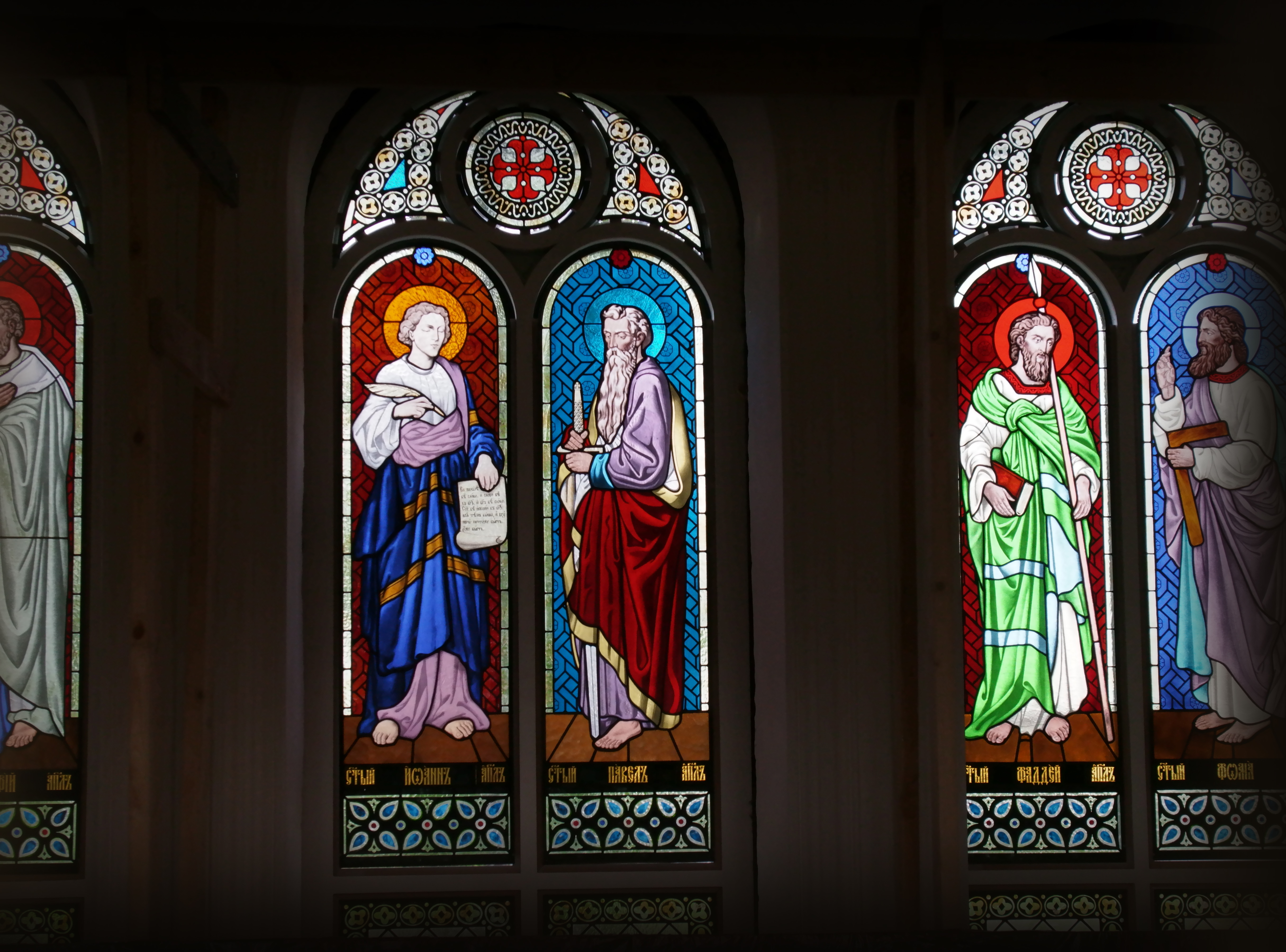 Апостолы, слева на право: Иоанн, Павел, Фаддей, Фома. Съемка произведена летом 2018г. во время монтажа оконных блоков и витражей в Церкви Смоленской иконы Божией Матери в п. Мыза.